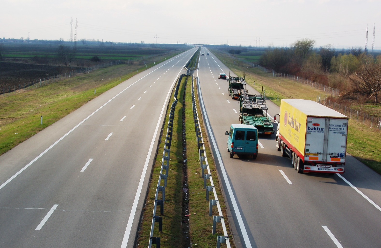 The corridor E70, near Sremska Mitrovica, Serbia, Vojvodina/La route européenne E70 près de Sremska Mitrovica, Voïvodine, Serbie